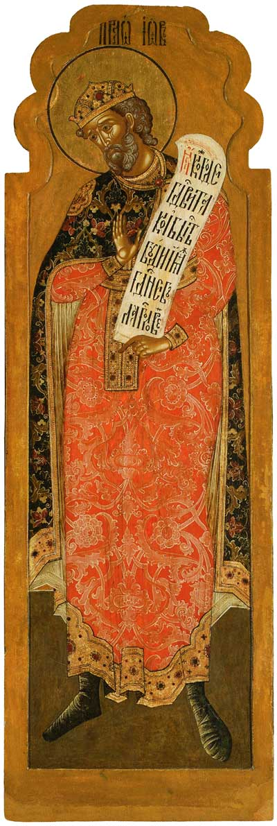 Праотец Иов. Праотеческий чин из главного иконостаса ц. Иоанна Златоуста в Коровниках в Ярославле